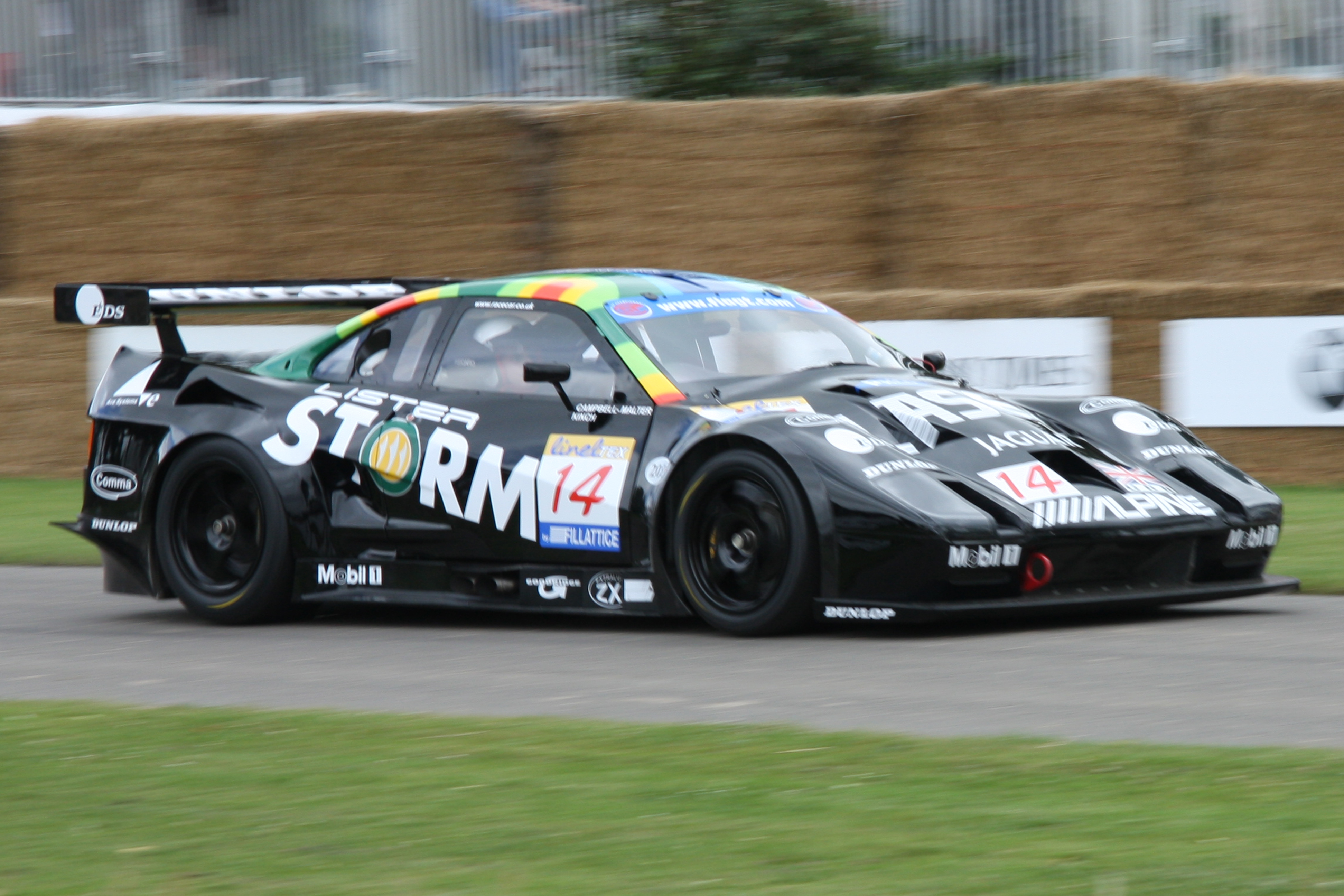 Built 2001. 7 litre V12